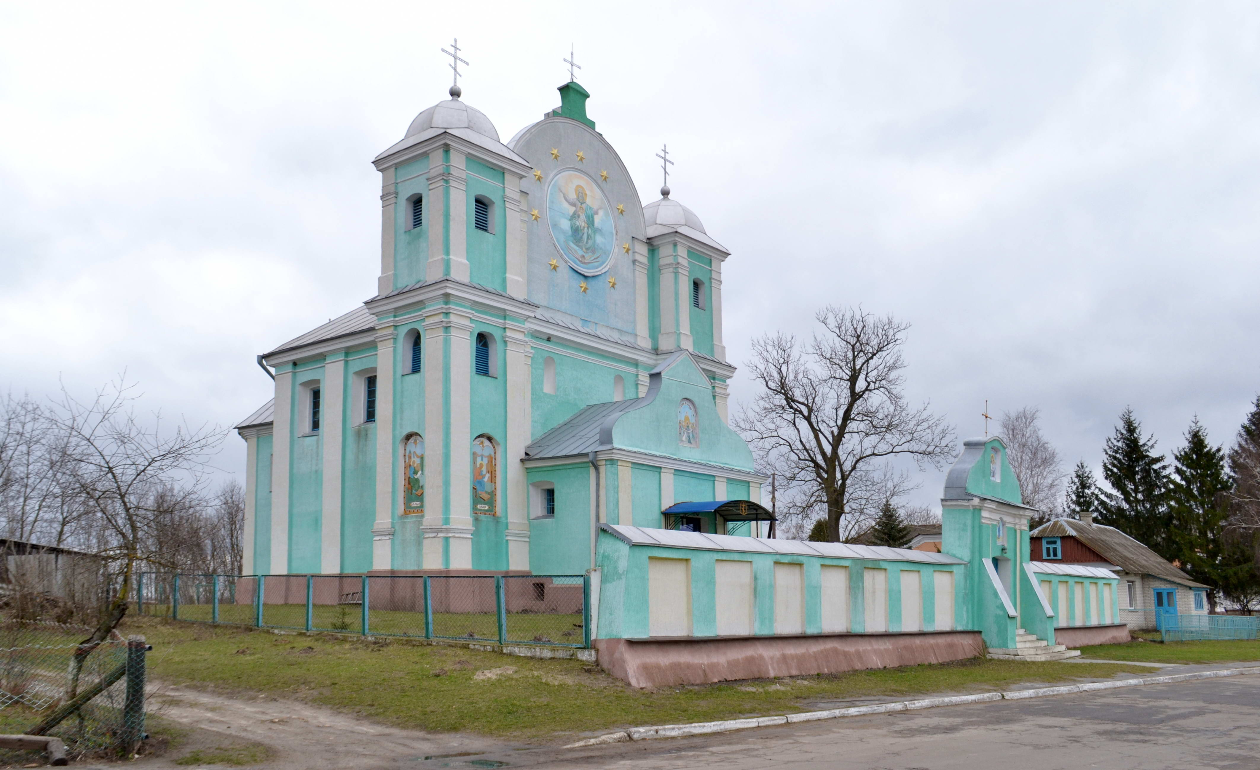 Успенська церква (мур.) (1751 рік) - вигляд з південного заходу - Радехів Любомльський район Волинська область Україна